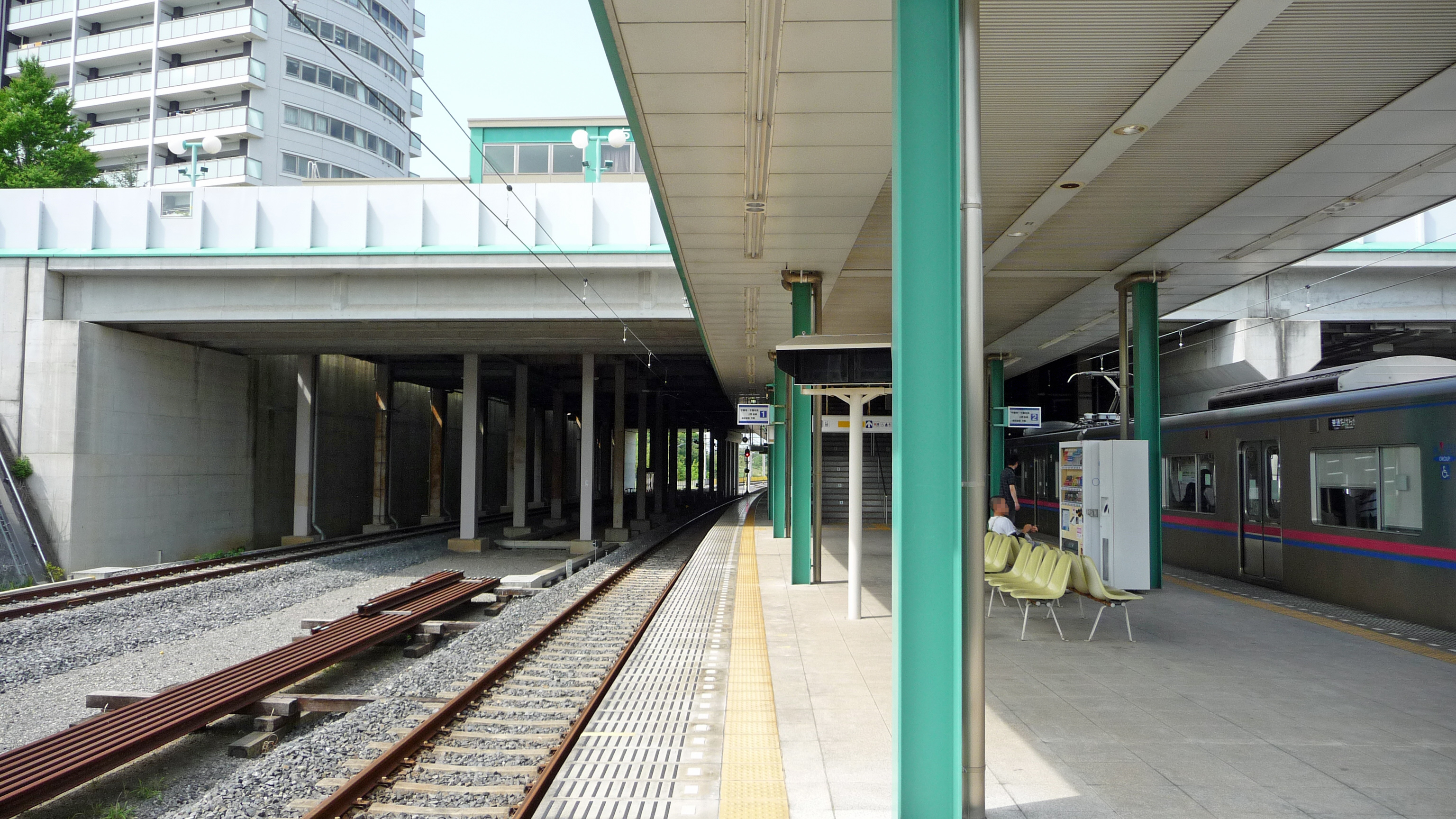 京成千原線ちはら台駅ホーム